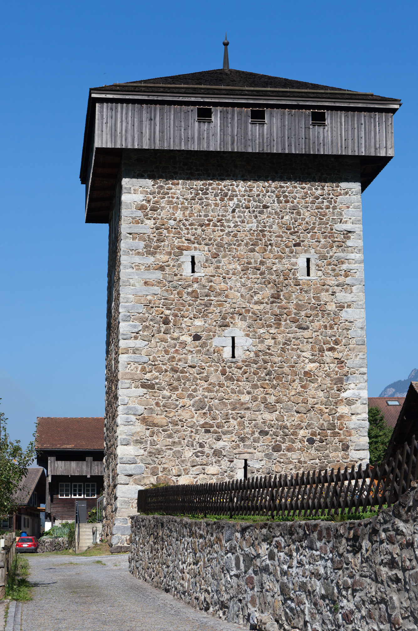 Der 5-stöckige Wohnturm der Edlen (Meierturm) in Silenen